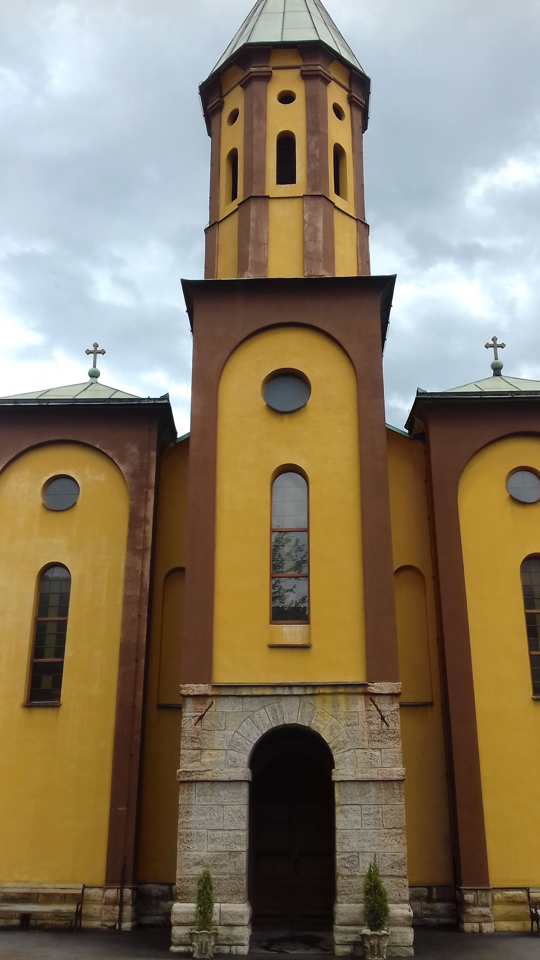 Жута СПЦ Богородице на Царини у Зеници